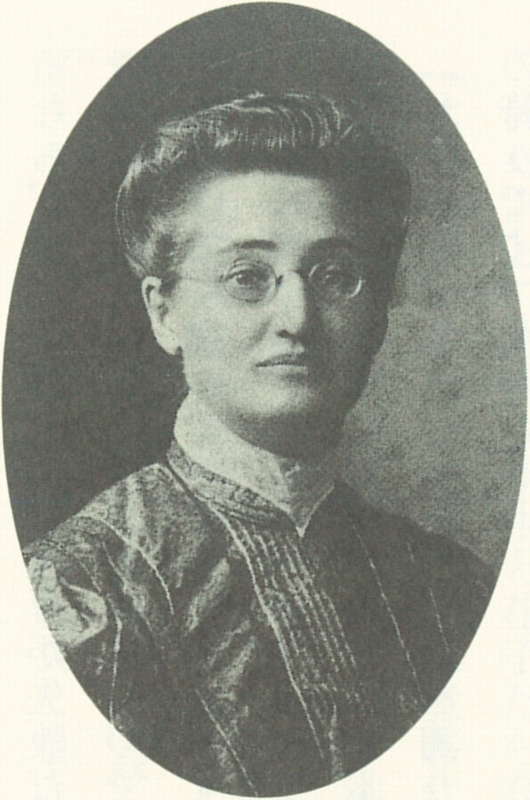 Isabella S Blackmore (イザベラ・ブラックモーア, Canadian, *1863, †1942) in Japan